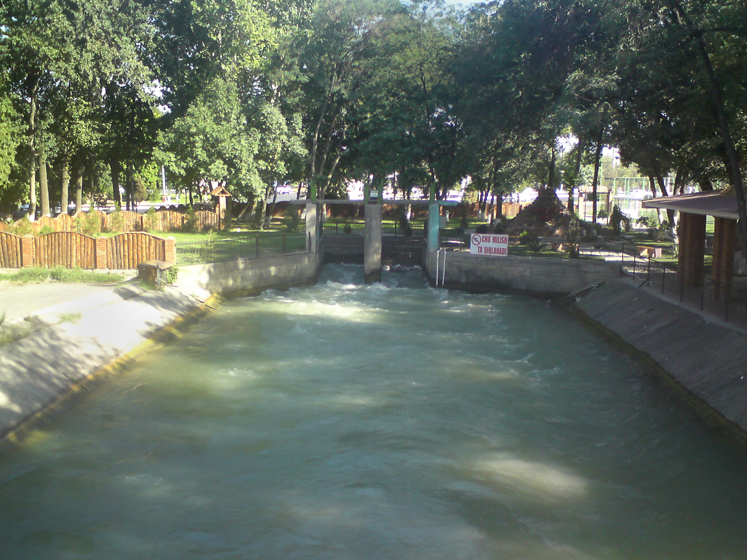 Канал Кечкурук в парке ПКиО "Себзар", город Ташкент